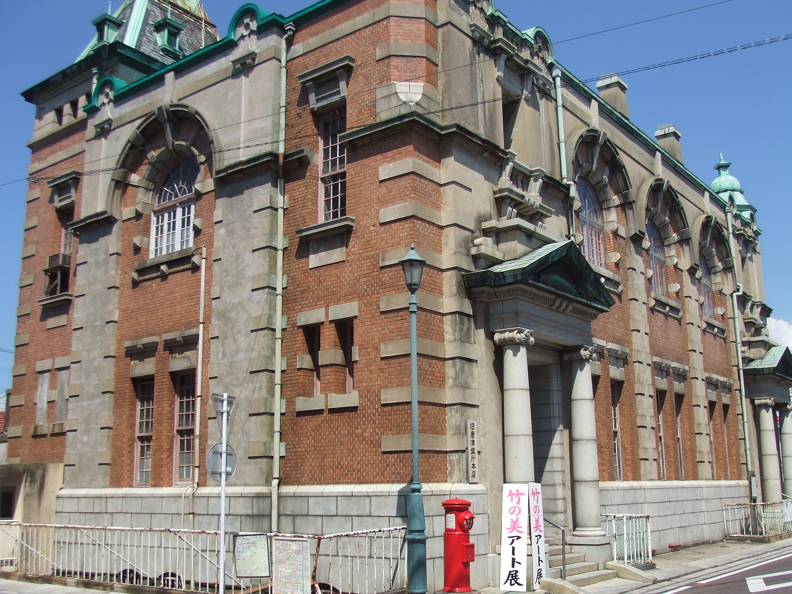 旧唐津銀行本店